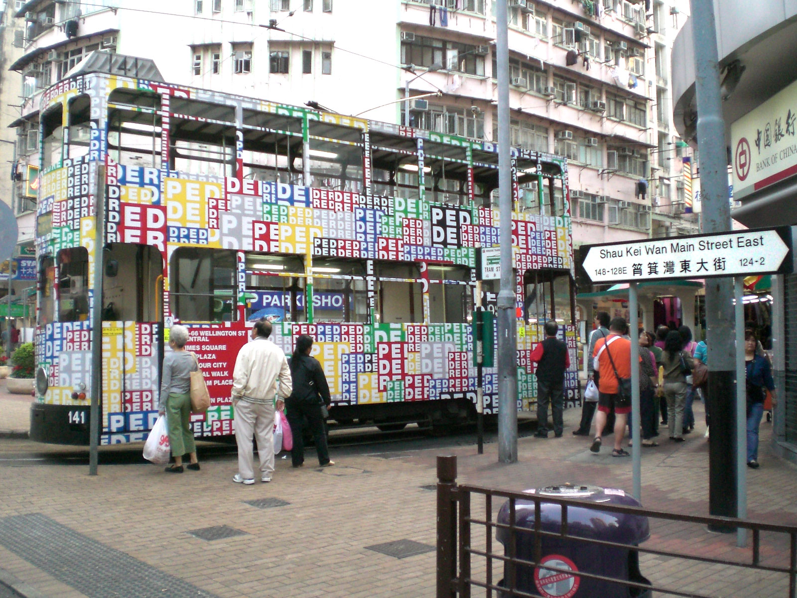 香港電車筲箕灣電車總站, 筲箕灣東大街 Shau Kei Wan Tram Terminus, Shau Kei Wan Main Street East, Hong Kong